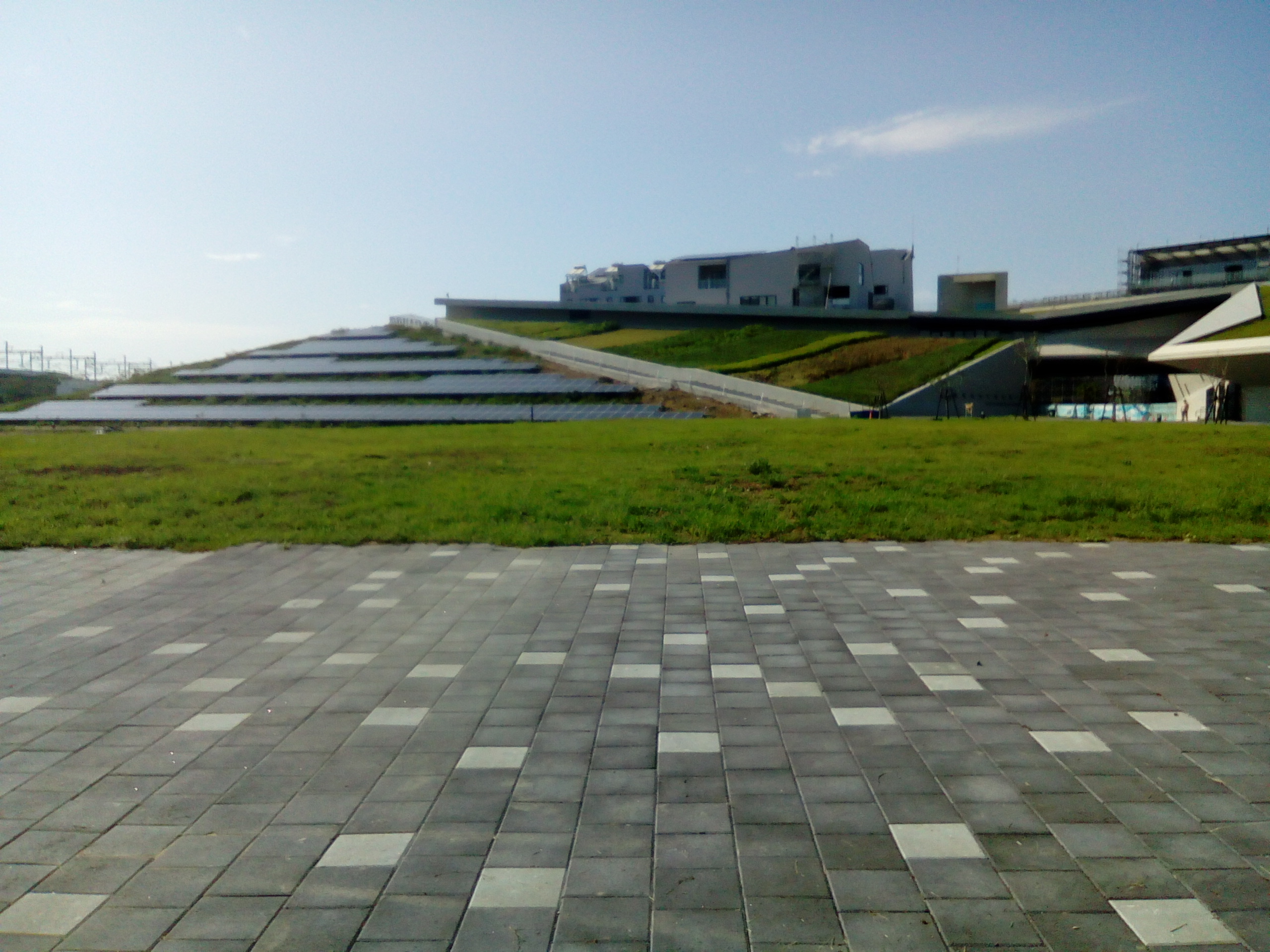 高鐵站周遭的大武路旁